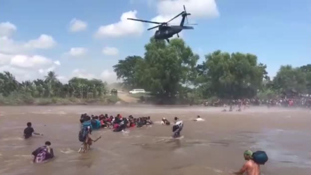 Migrantes cruzan frontera entre México y Guatemala